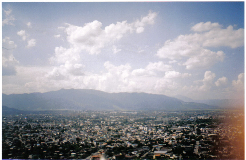 Barata (sub-bairro de Realengo) visto de cima em 2006